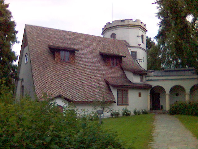 Gallen-Kallela museum taget sommaren 2005